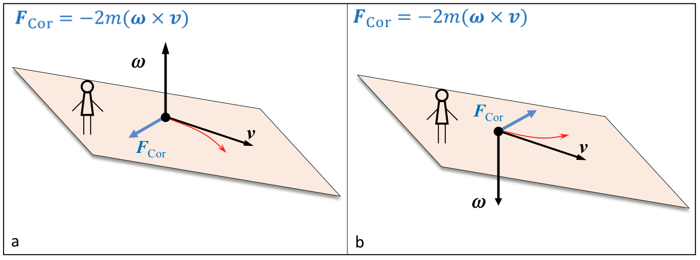 Coriolisen inertzia-indarraren efektua partikulen ibilbide horizontalean: a) Ipar hemisferioan; b) Hego hemisferioan.